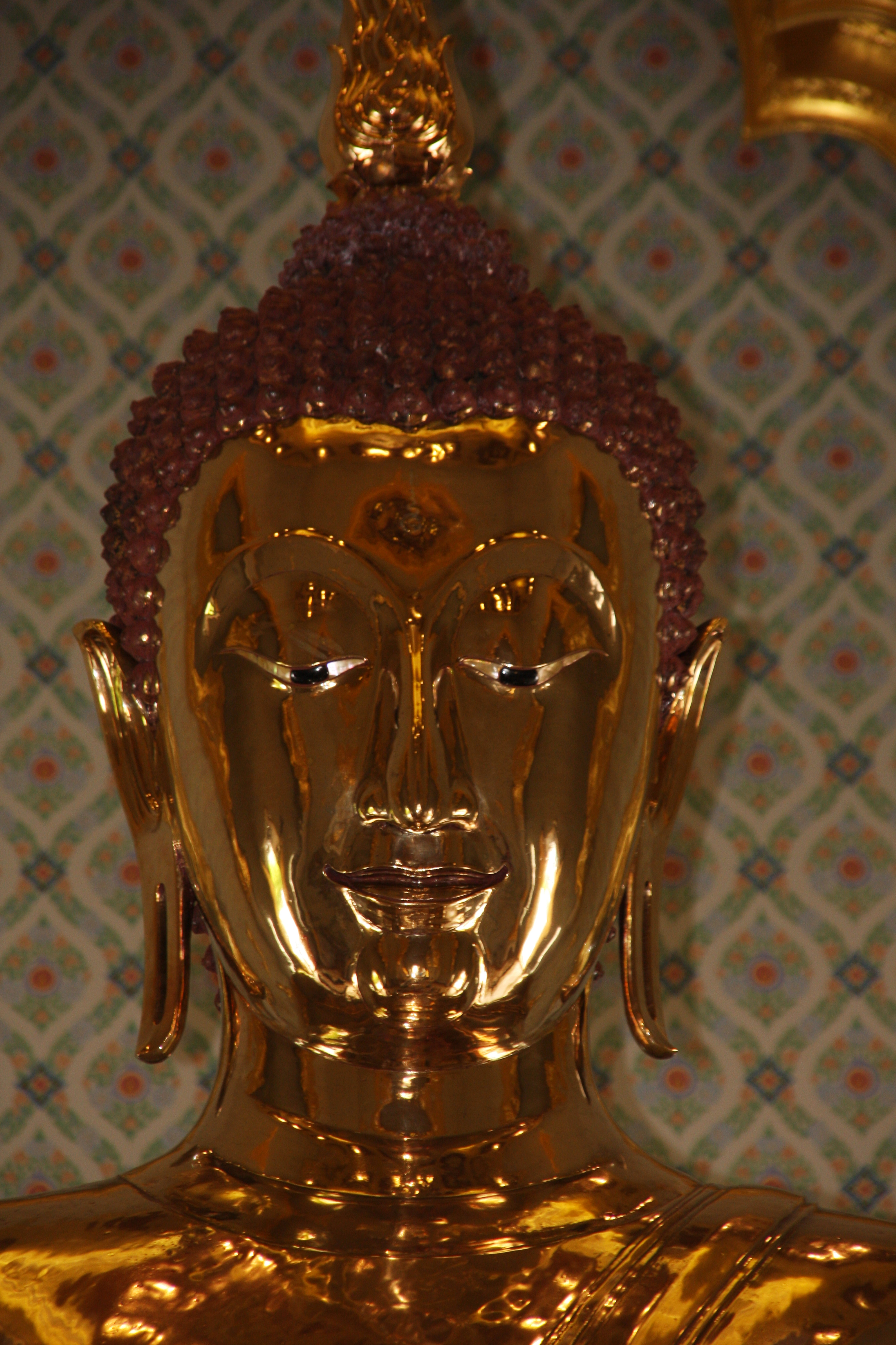 Buddah 2